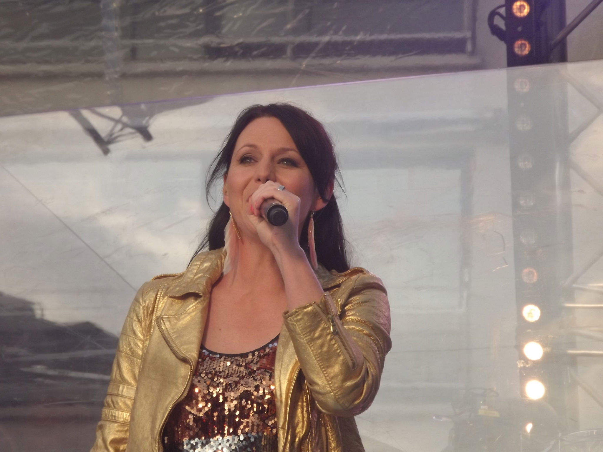 Zangeres Kristel Verbeke (K3) tijdens de opnames van Vlaanderen Muziekland in Blankenberge op 28 juli 2012